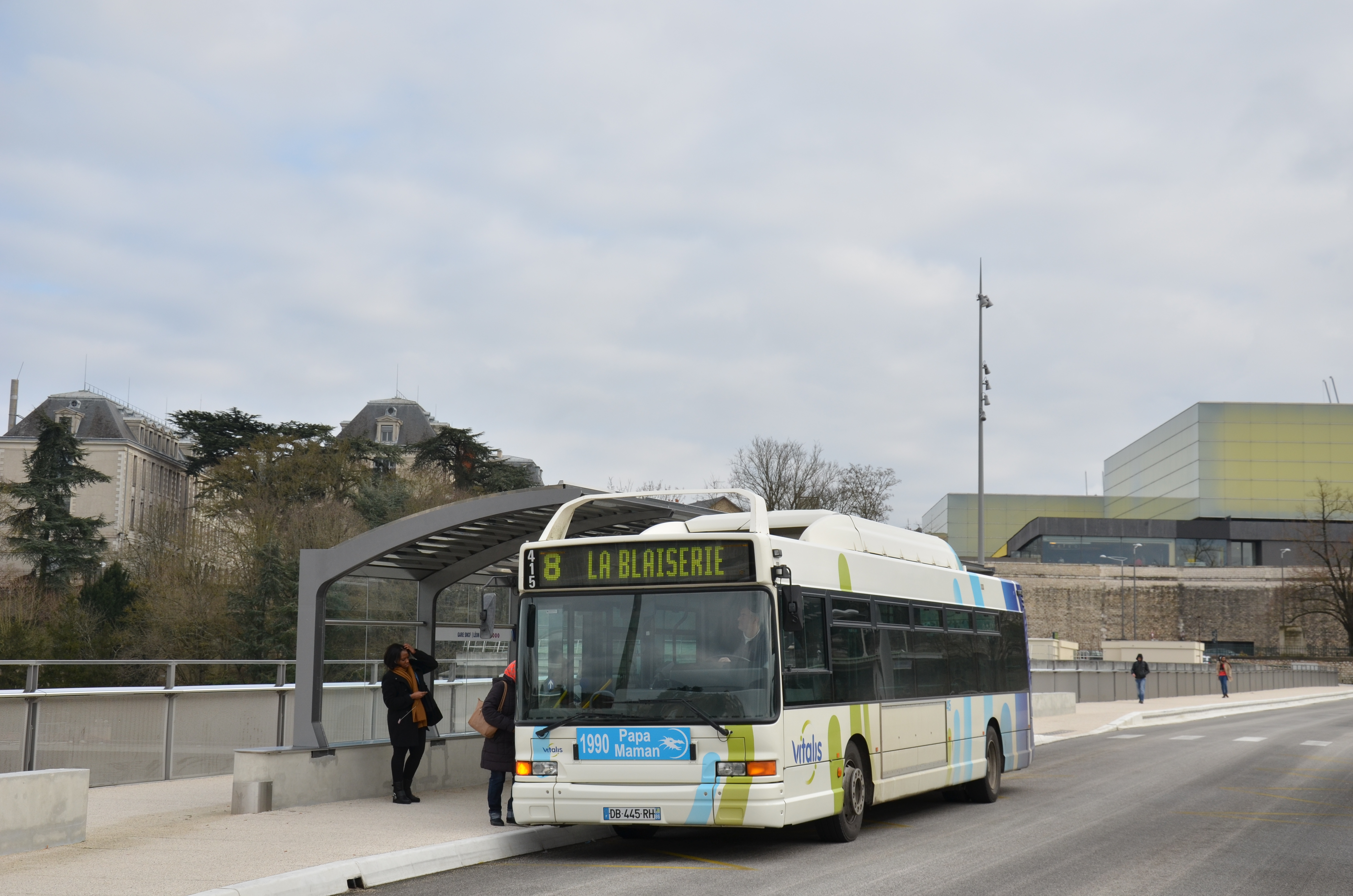 Heuliez GX 317 n°415 sur la ligne 8 du réseau Vitalis de Poitiers, à l'arrêt Gare SNCF (Léon Blum).